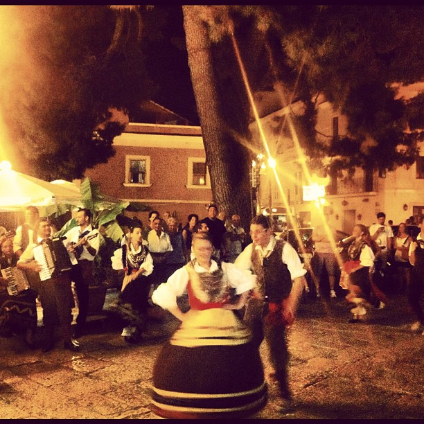 Spettacolo per strada (Rodi Garganico)